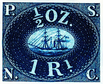 1 real azul 1857